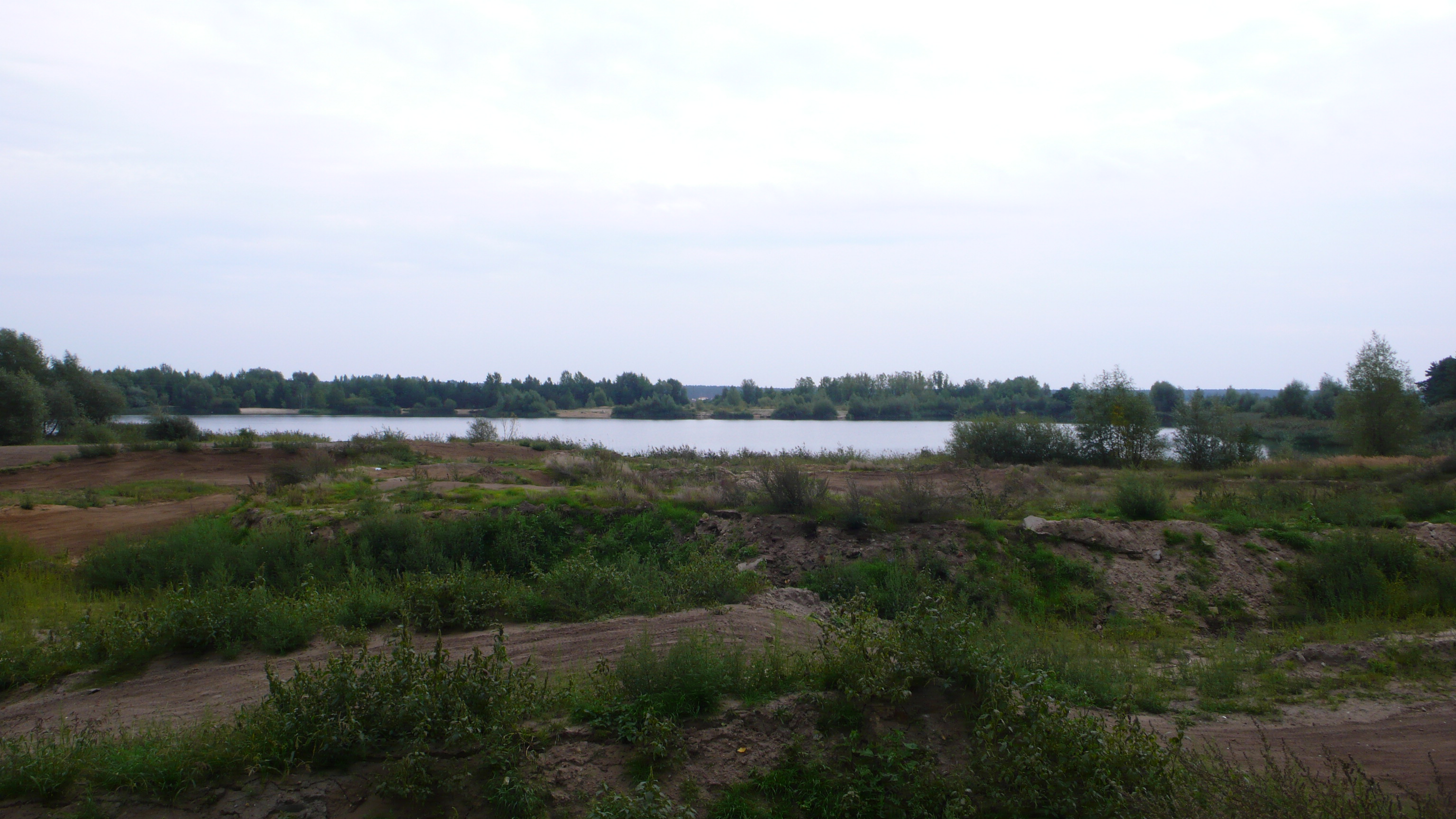 Zbiornik w Zaborowie widok od północy. Na pierwszym planie tor motokrosowy.